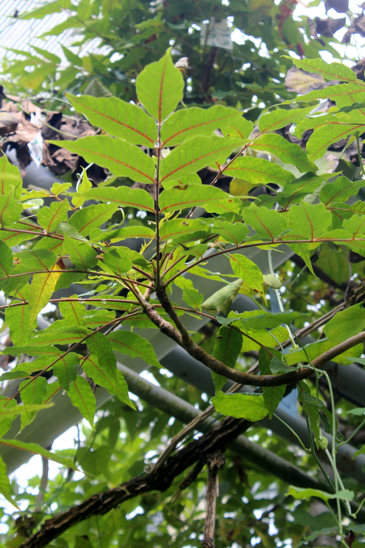 Polyscias aemiliguineae, photo prise au Conservatoire national de botanique de Brest à l'occasion du "Wiki takes Conservatoire Botanique National de Brest"